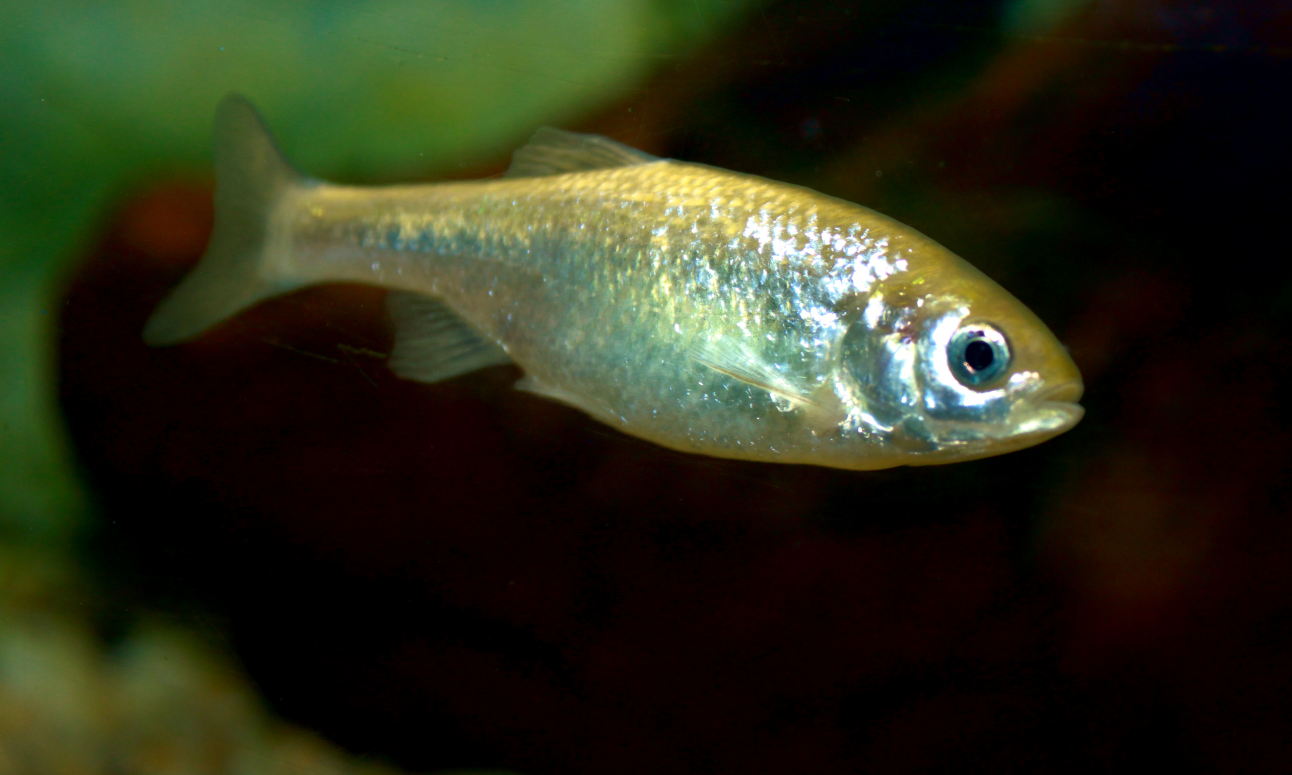 Beautiful Shiner, juvenile, Cyprinella formosa